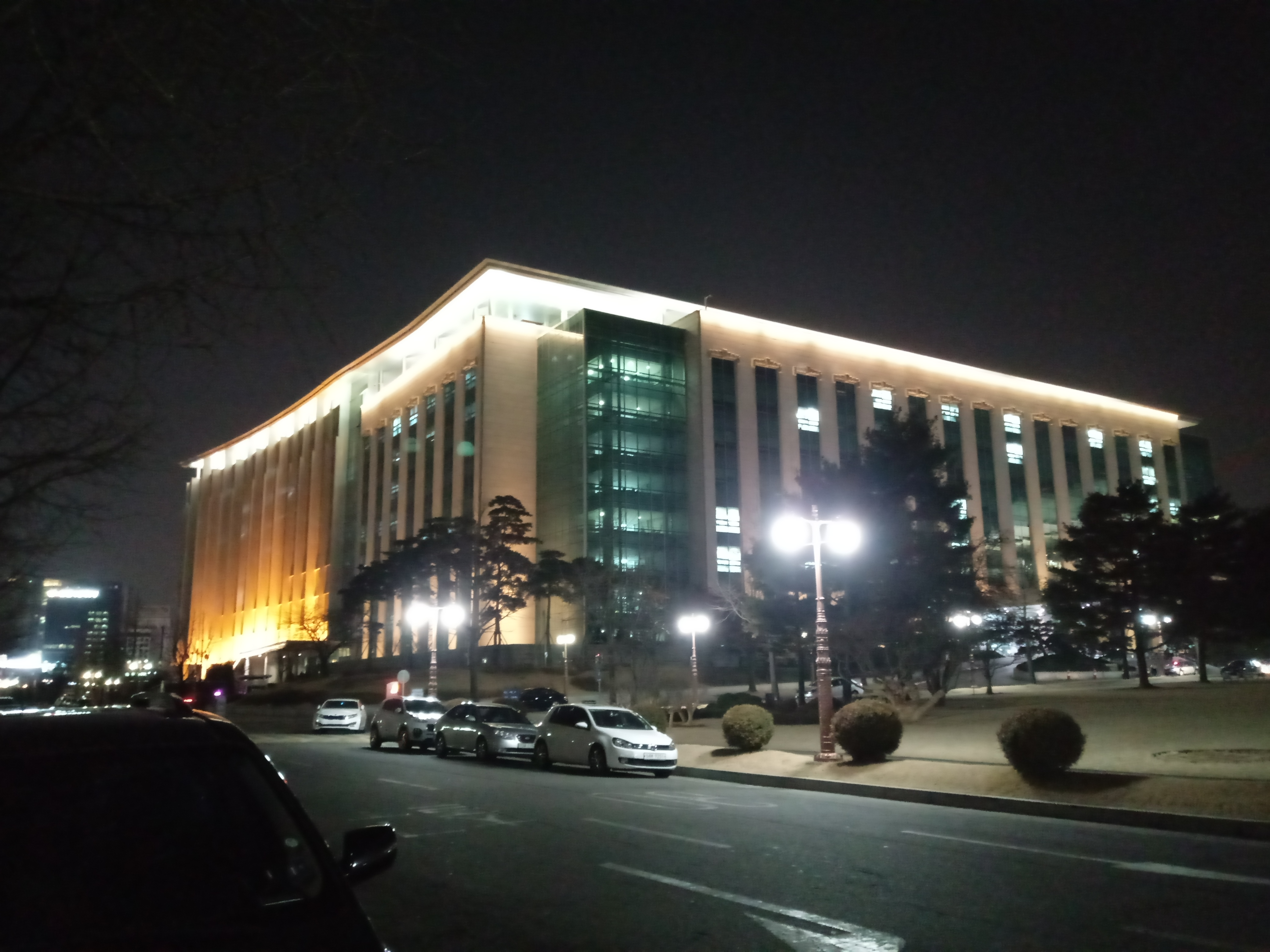 대한민국 국회 의원회관 야경